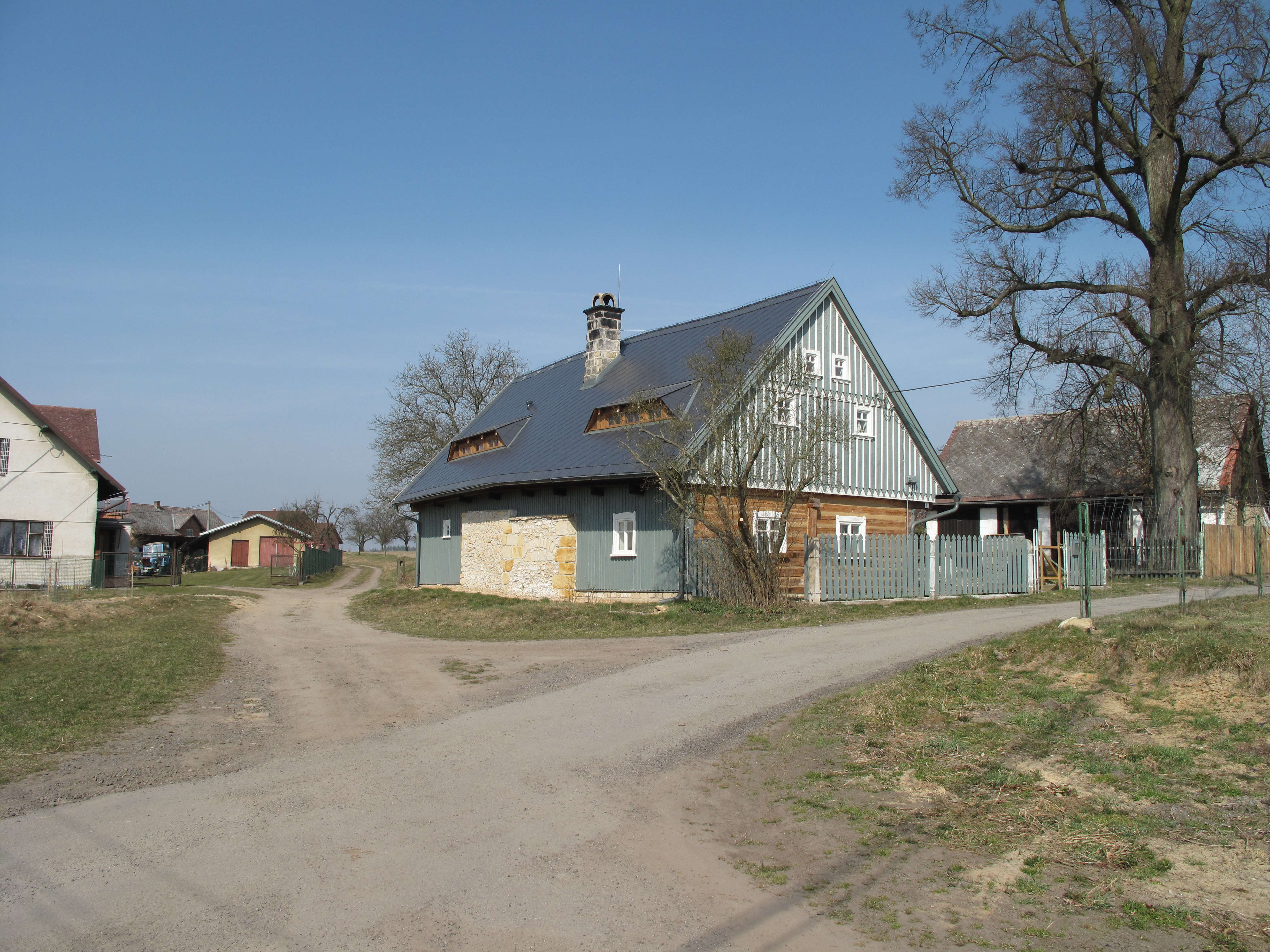 Roubenka ve Vápně. Okres Liberec, Česká republika.